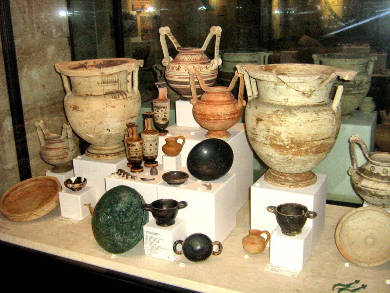 Una foto dei reperti messapici presenti nel museo "U. Granafei"